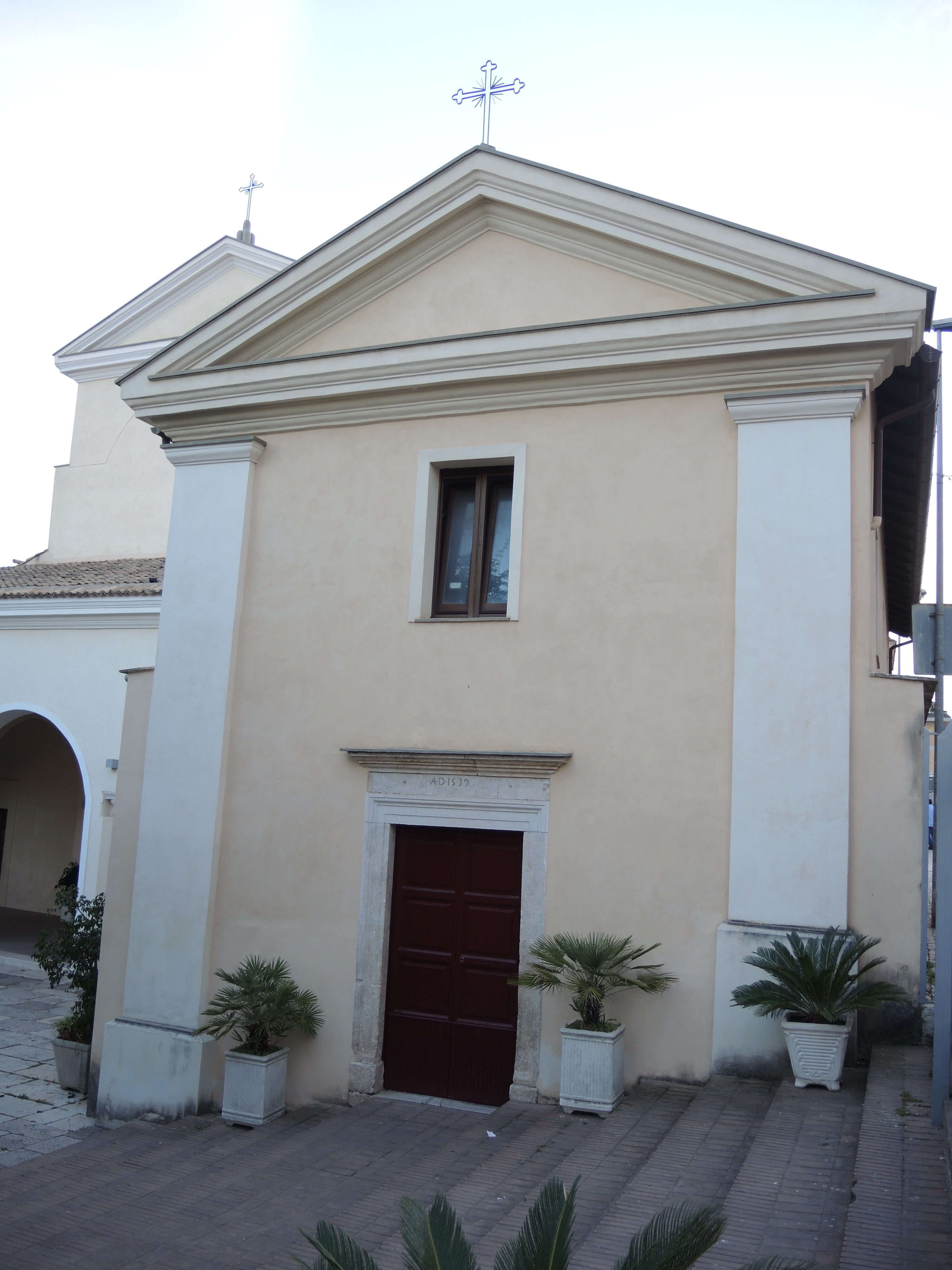 Formia: Cappella di San Probo